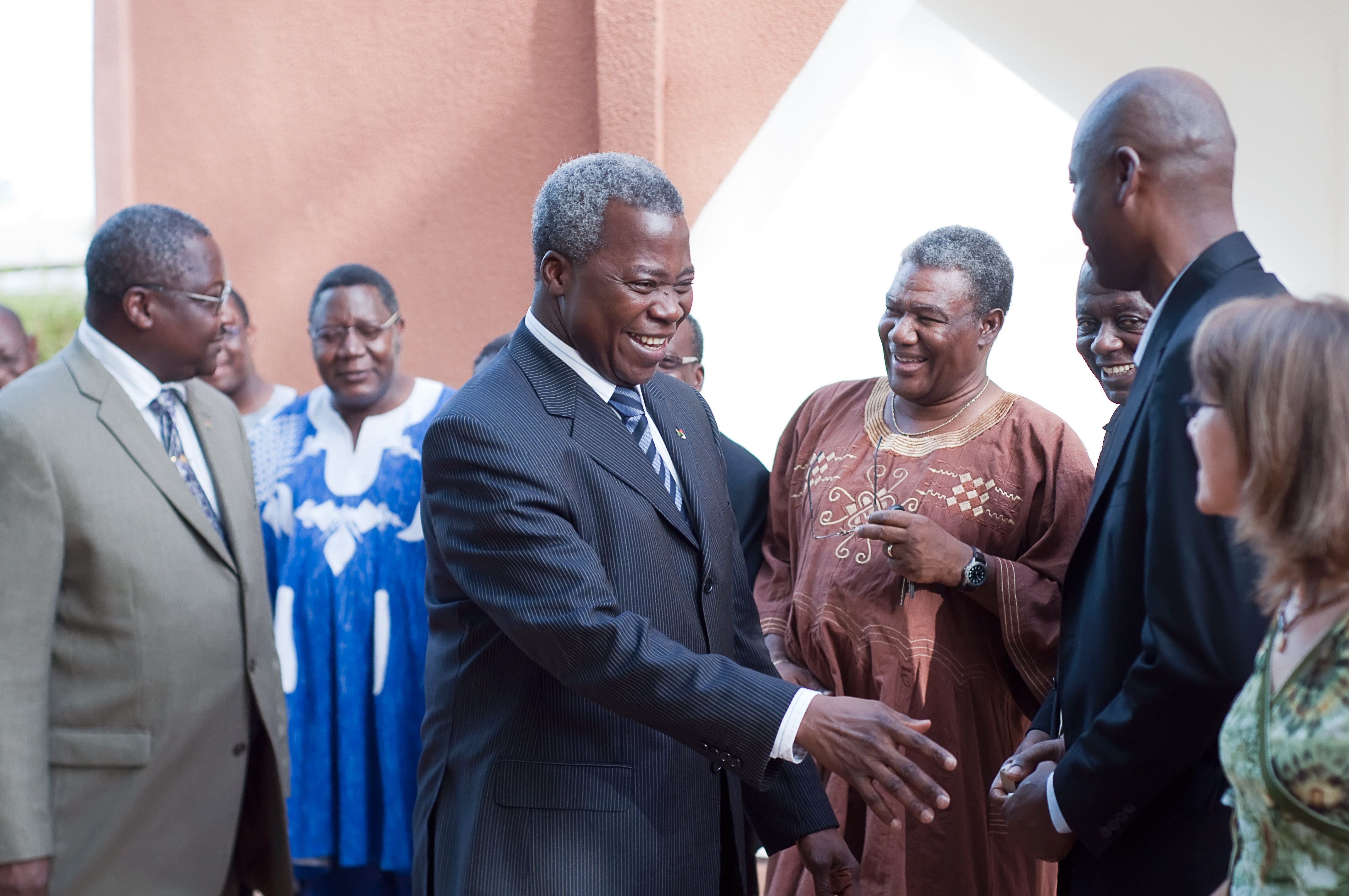 L'Ancien Premier Ministre burkinabè Tertius Zongo (4 juin 2007 - 18 avril 2011)